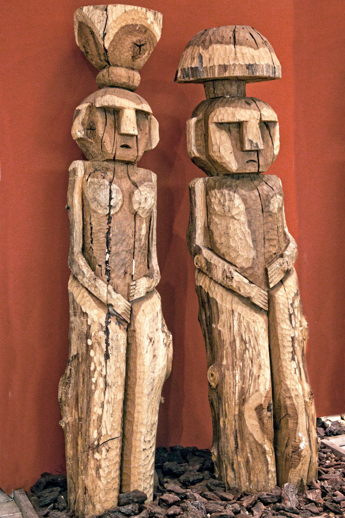 Santiago, Chile